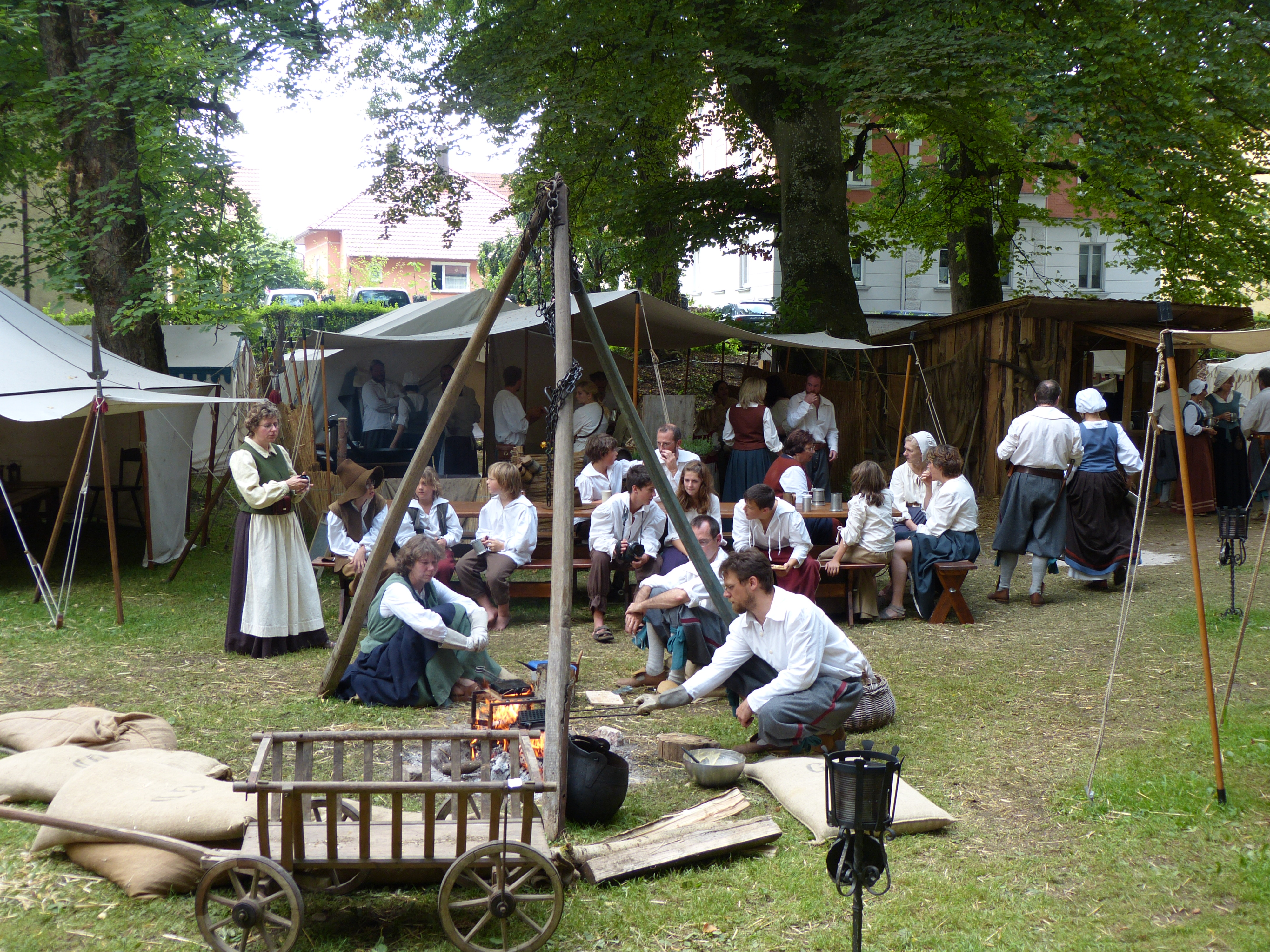 Wallensteinfestspiele 2012 in Memmingen, Bayern